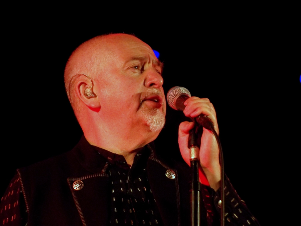 Zdjęcia zrobione podczas III Life Festival w Oświęcimiu.